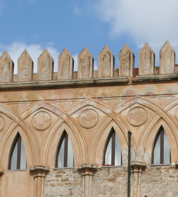 Merlatura del Palazzo dei Normanni in Palermo, Sicilia, Italia.